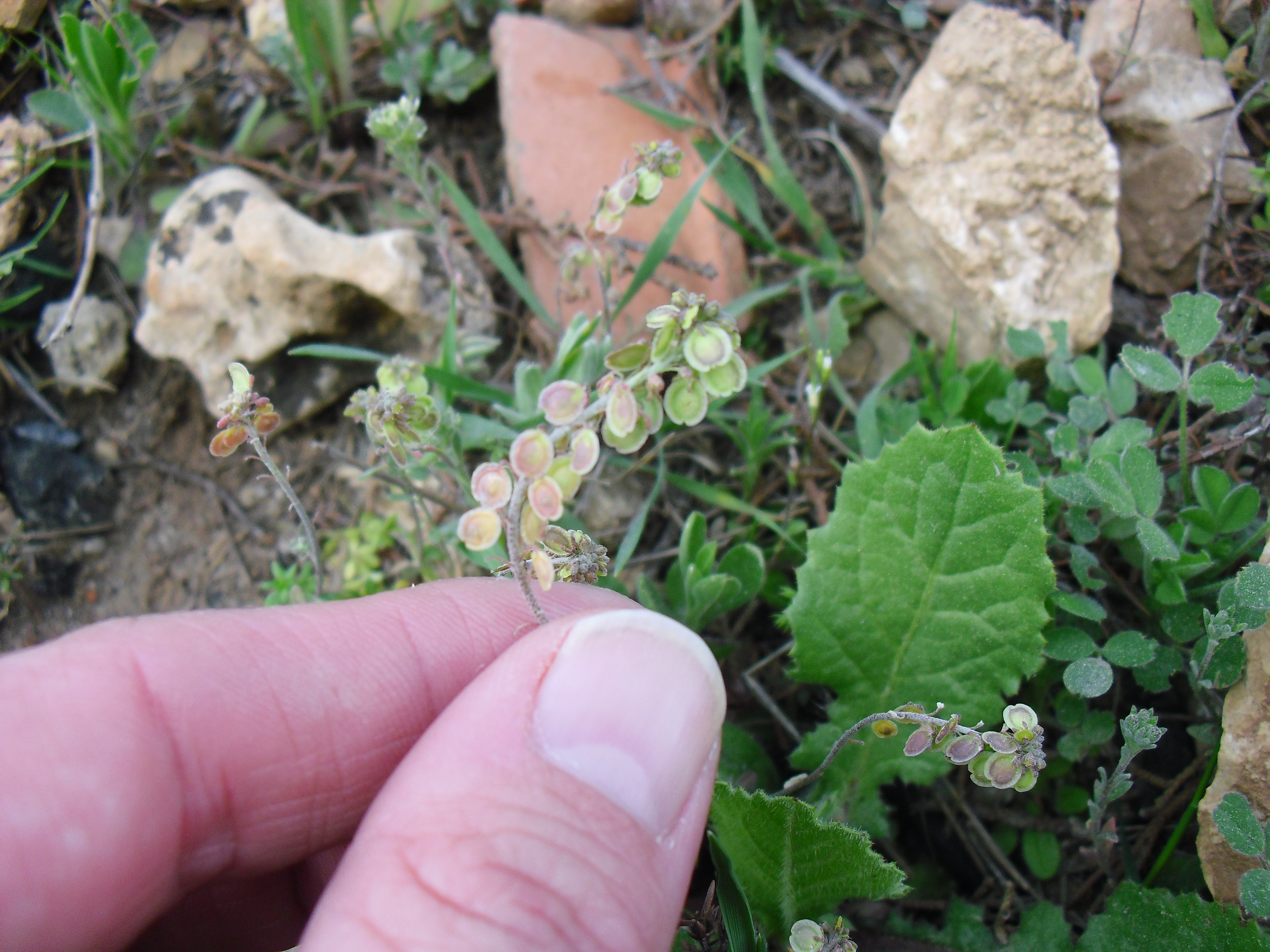 frutos